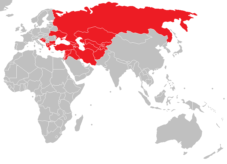 Distribution of Pseudopus apodus, countries only